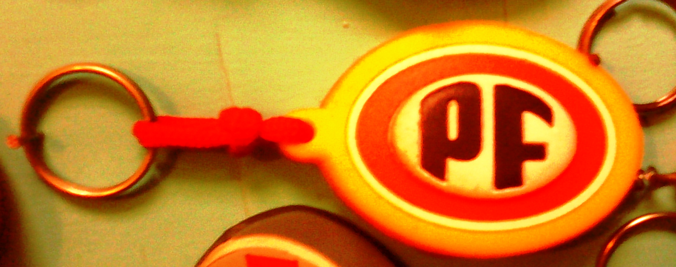 Llavero de la empresa chilena de alimentación PF.